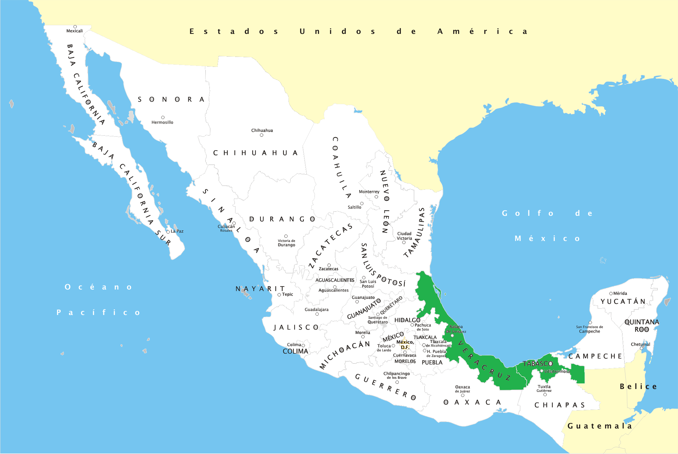 asentamientos de la cultura olmeca